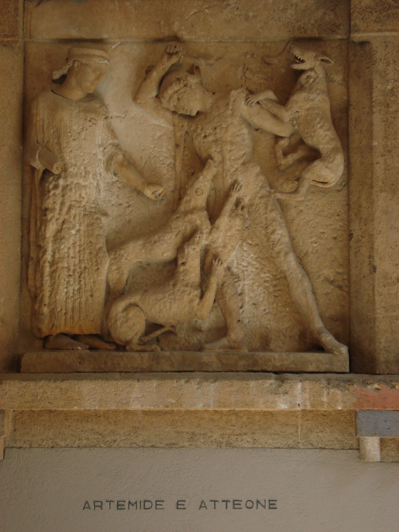 Dal Tempio E di Selinunte: Artemide fa sbranare Atteone dai suoi cani per punirlo di averla vista nuda. Ca. 450 a.C. La scultura, che era in origine policroma, è in calcare, salvo gli arti della dèa, che sono in marmo bianco. Museo archeologico regionale di Palermo, 28 settembre 2006. Foto di Giovanni Dall'Orto.